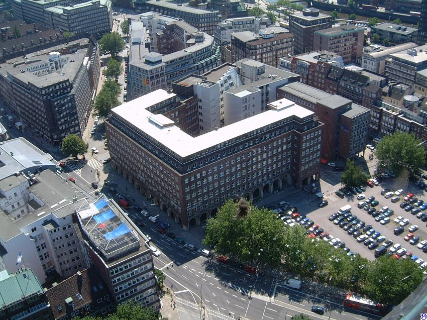 Pressehaus (Helmut-Schmidt-Haus) im Hamburger Kontorhausviertel von St. Petri, rechts im Vordergrund der Domplatz vor der Umgestaltung This is a photograph of an architectural monument.